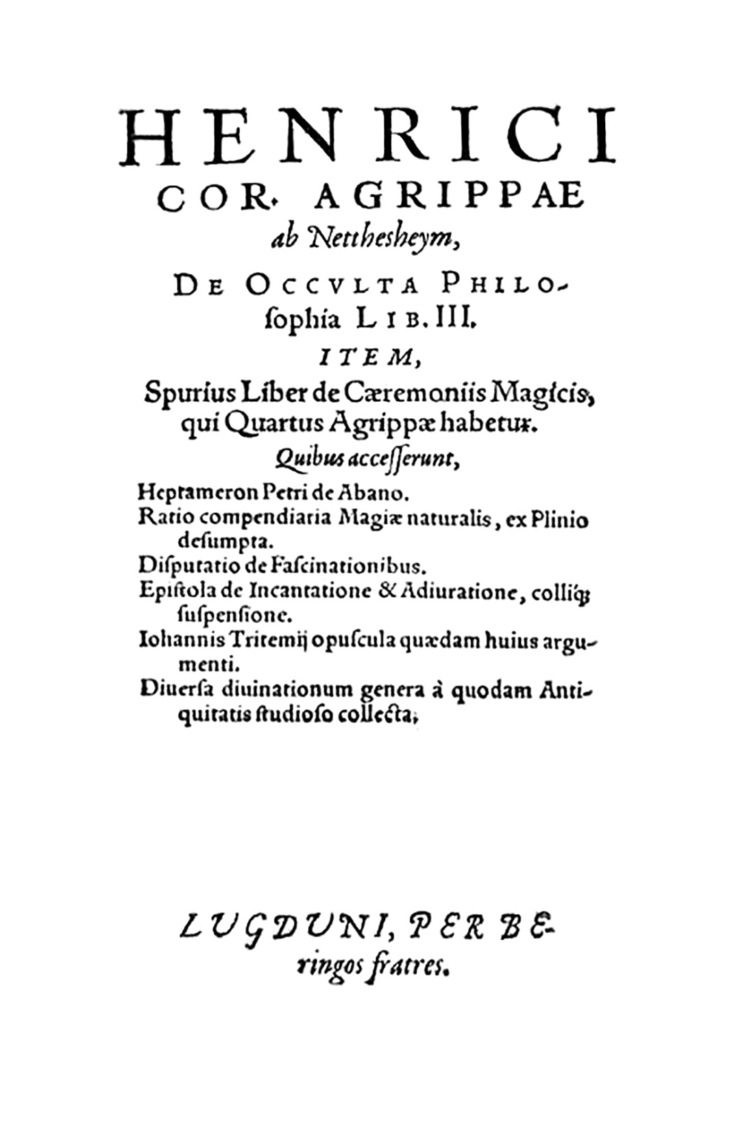 Title page De Occulta Philosophia Libri tres